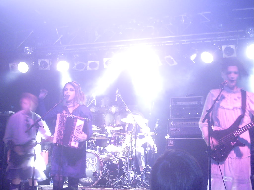 Stolen Babies-Bandphoto